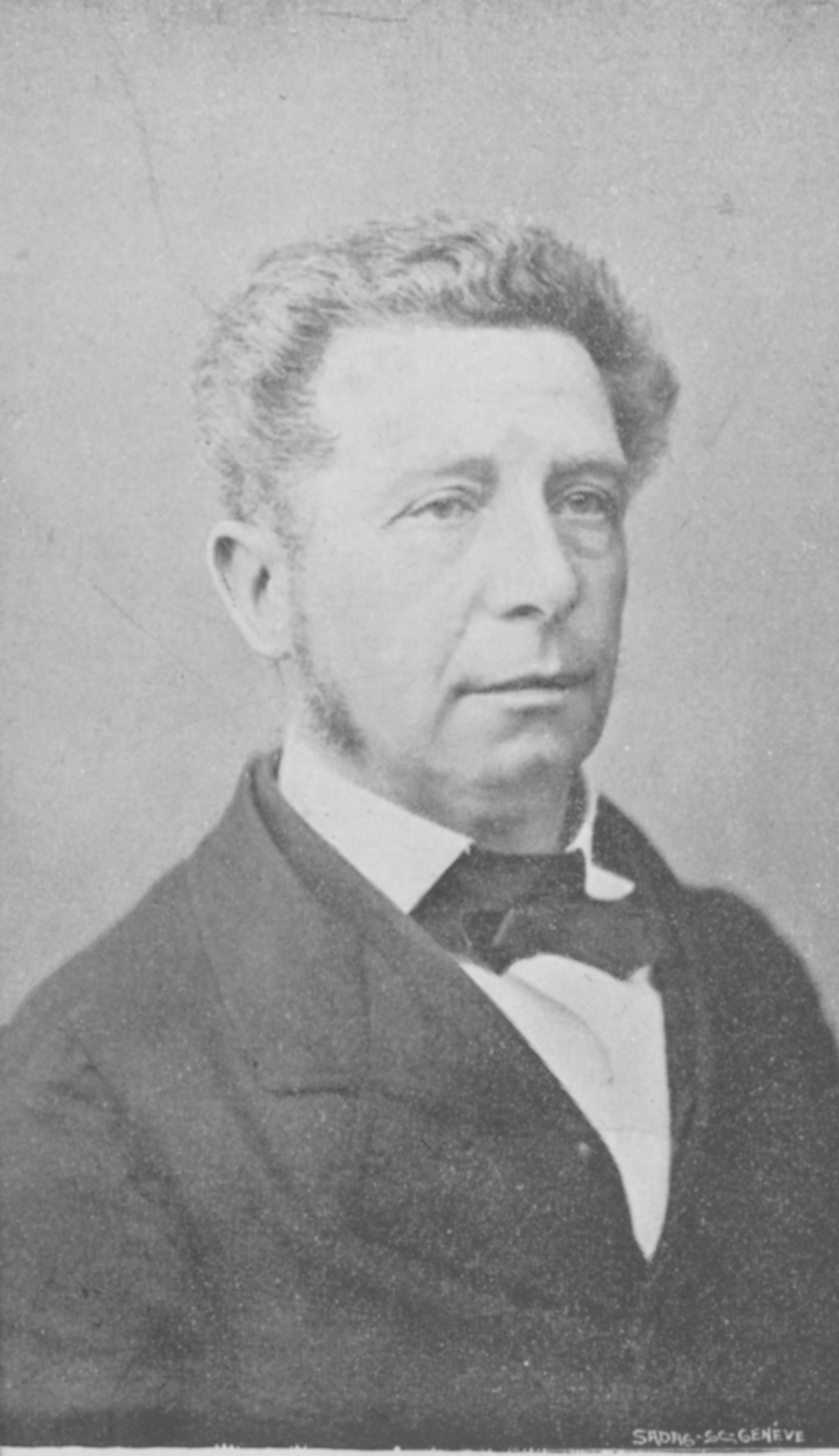 Portrait des Theologen Albert Schaffter (1823-1897)